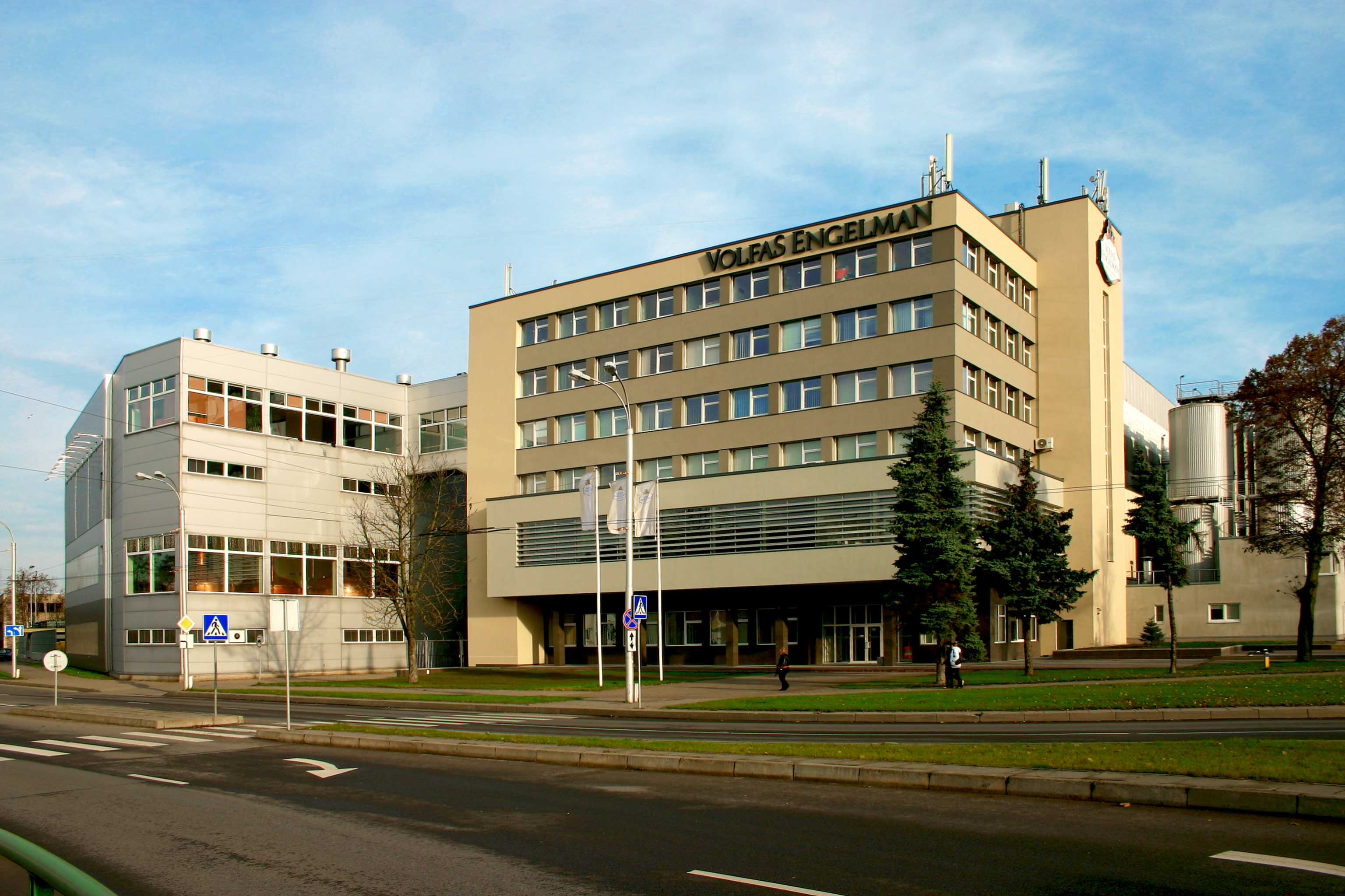 Volfas Engelman bravoras